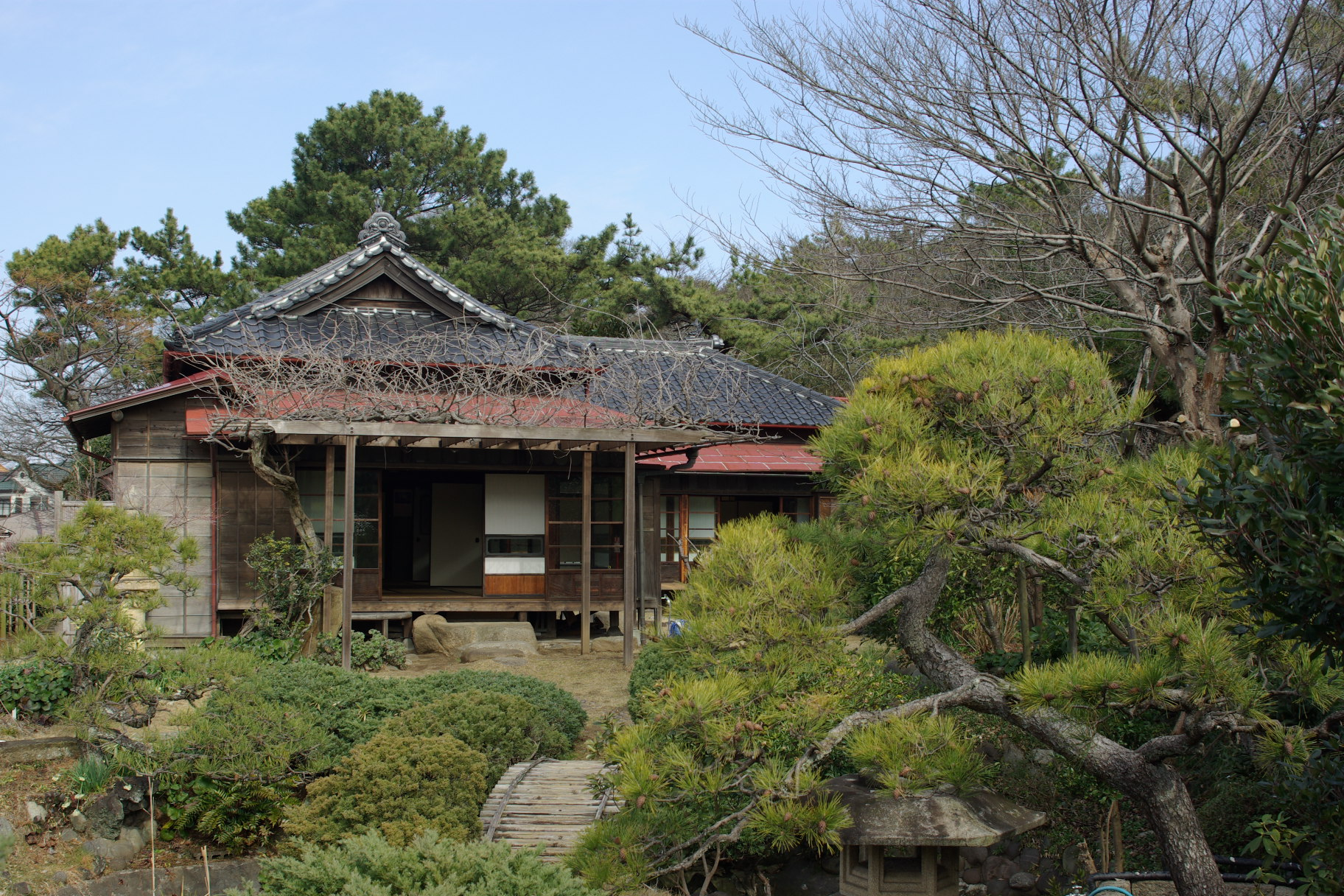 愛新覚羅溥傑仮寓（千葉市稲毛区）